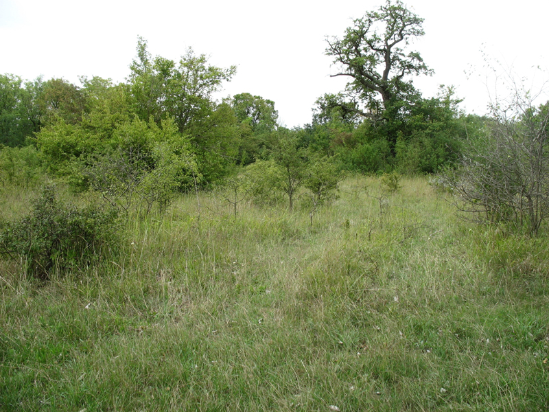 Habitate of Mantis religiosa, Lobau, Vienna